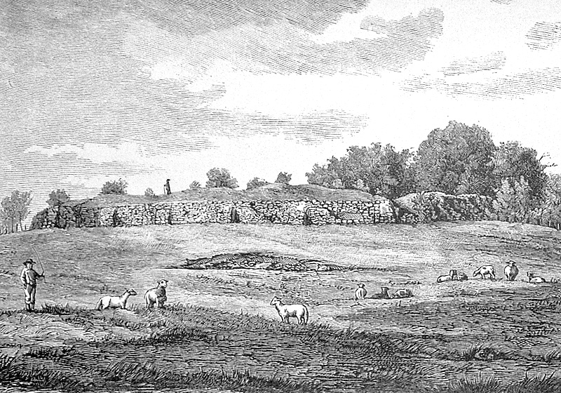 Ruiner af Søborg Slot. Slottet, der ødelagdes i Grevens Fejde, hørte til Danmarks ældste Borge. Det benyttedes oftere som Statsfængsel (Buris, Bisperne Valdemar og Jens Grand).